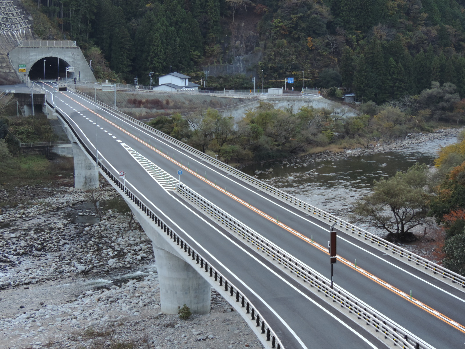 浦川インターチェンジ（浜松市天竜区）。大千瀬川を挟んでランプが設けられている。